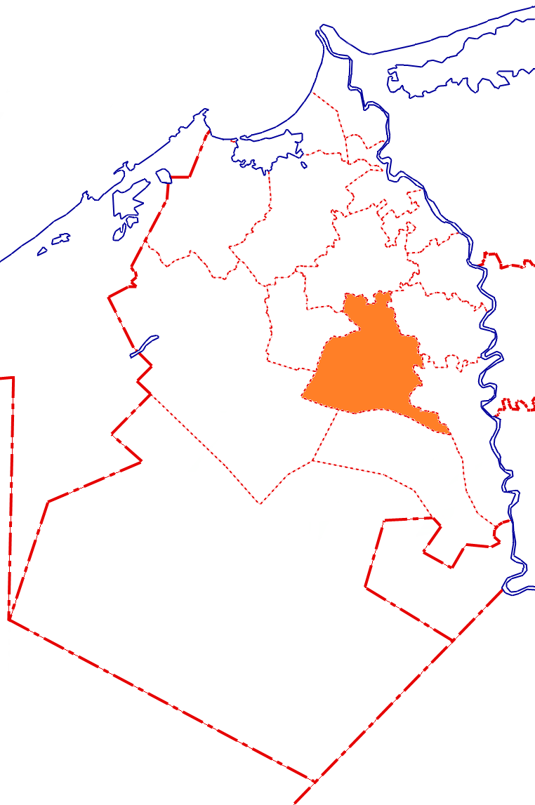 خريطة مركز الدلنجات بالنسبة لمحافظة البحيرة، مصر.